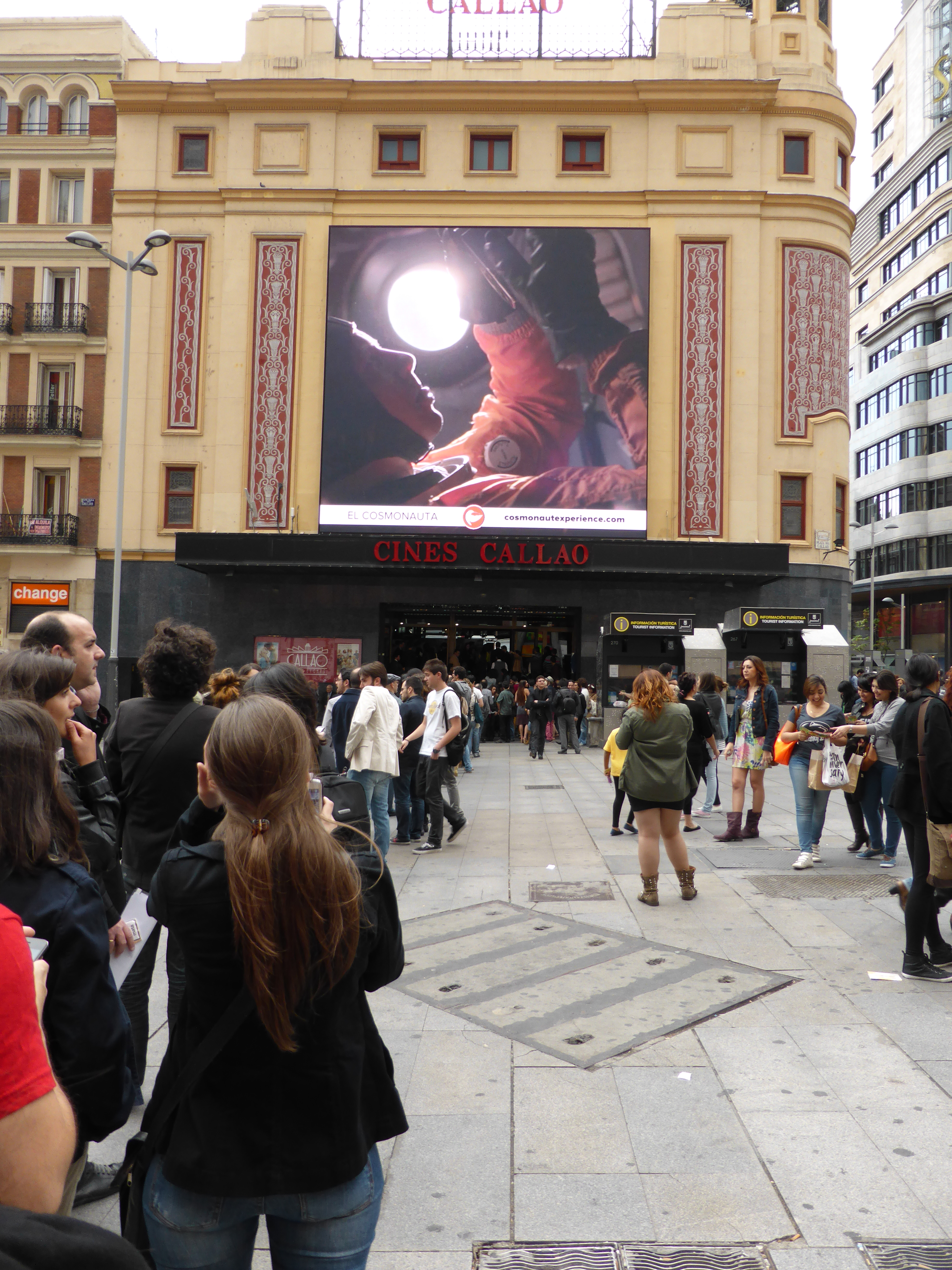 Exterior del Cine Callao, en Madrid. Cola para entrar a ver la película española de largometraje titulada "El Cosmonauta". Primera sesión del pre-estreno. Martes 14 de mayo de 2013. Producción de la película: Riot Cinema Collective. Género: ciencia ficción, o historia ficción.